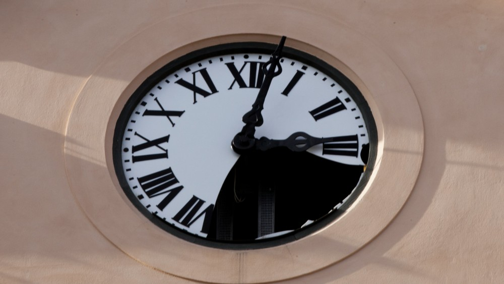 Часы на площади Youngstorget